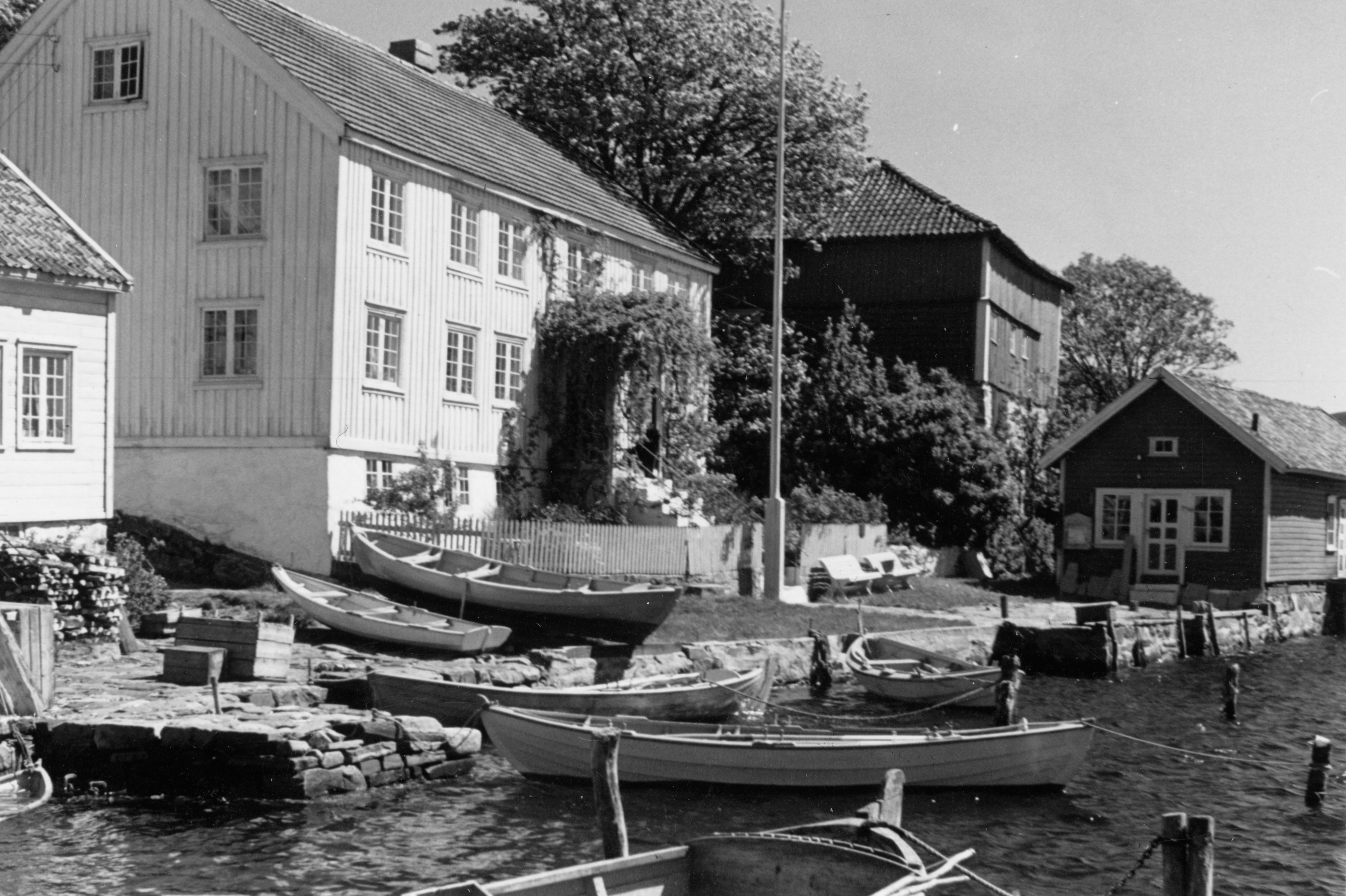 Tollboden i Brekkestø, Aust-Agder This image on crowdsourcing geotagging platform Fotodugnad